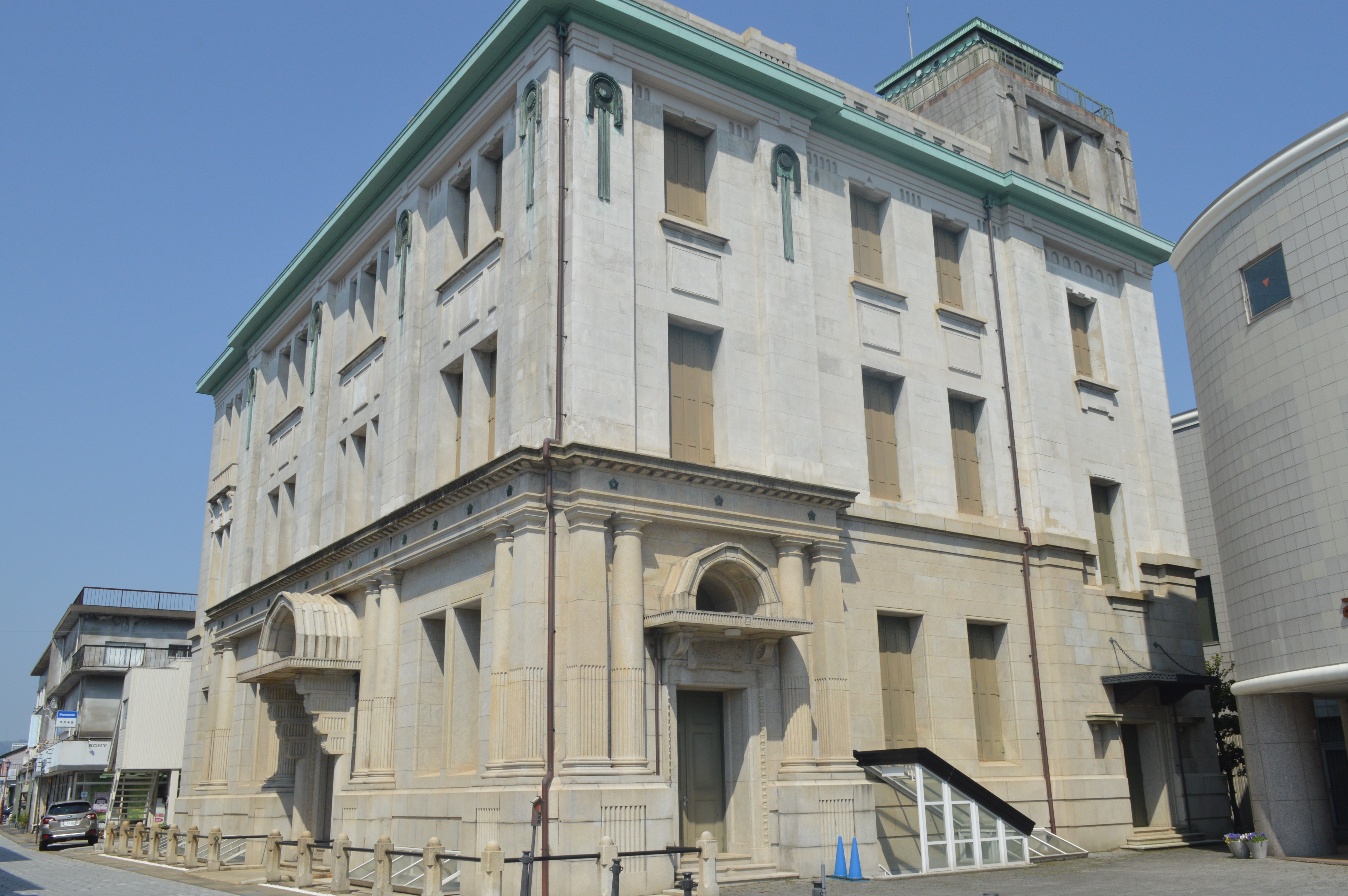 福井県敦賀市相生町7-8にある敦賀市立博物館。重要文化財。